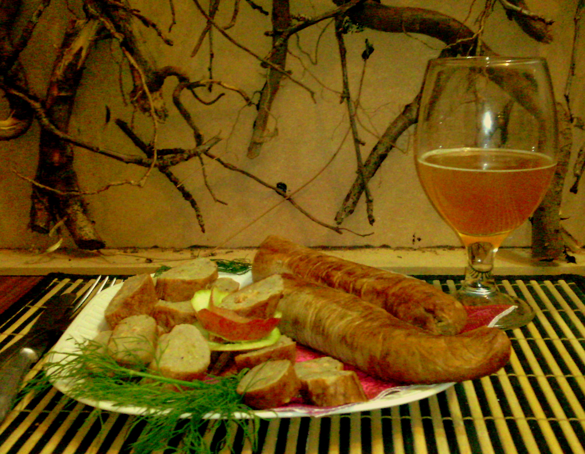 Kiszka ziemniaczana – tradycyjna potrawa kuchni białoruskiej. Беларуская (тарашкевіца): Кішка бульбяная – традыцыйная страва беларускай кухні.